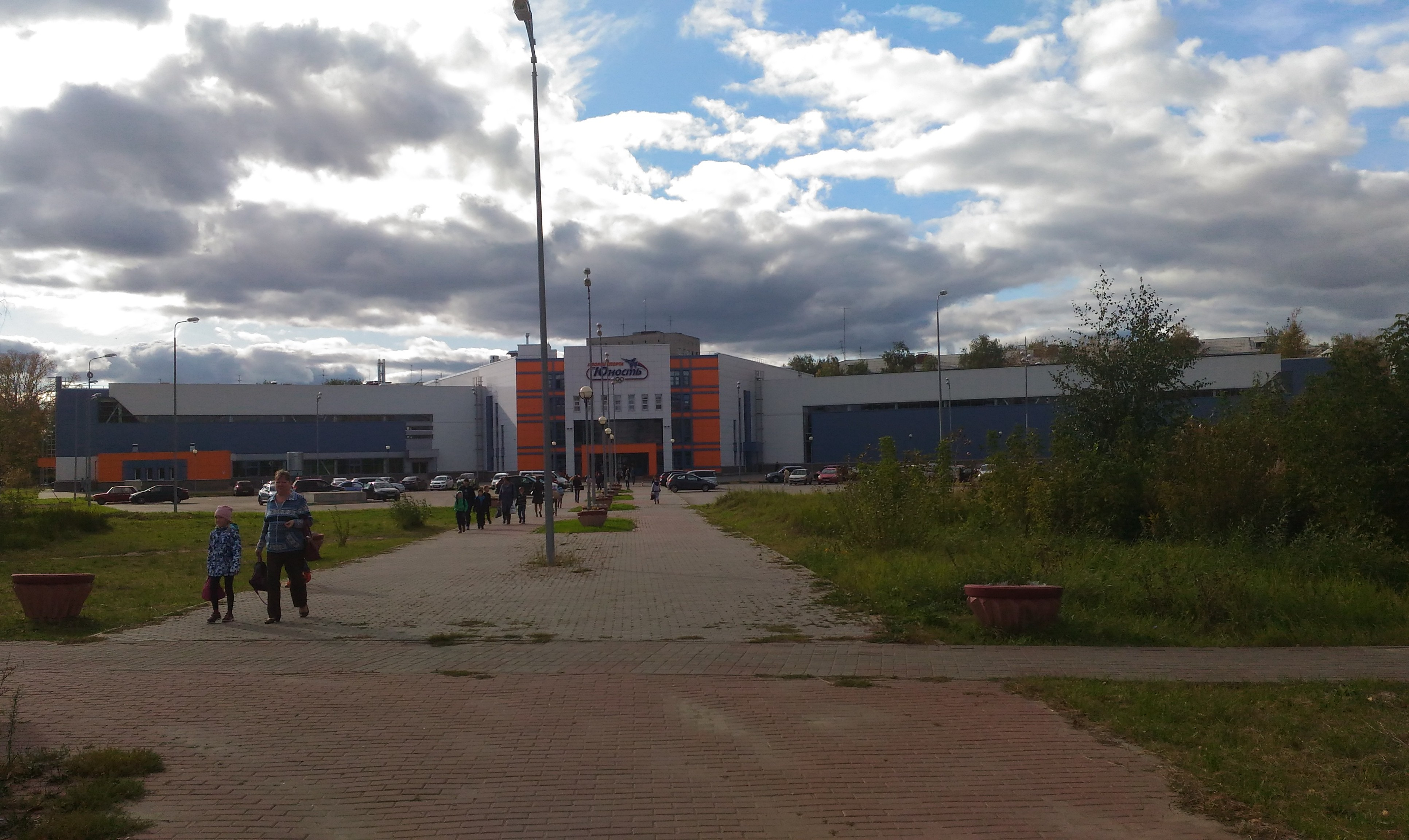 Нижний Новгород, Дворец спорта "Юность"